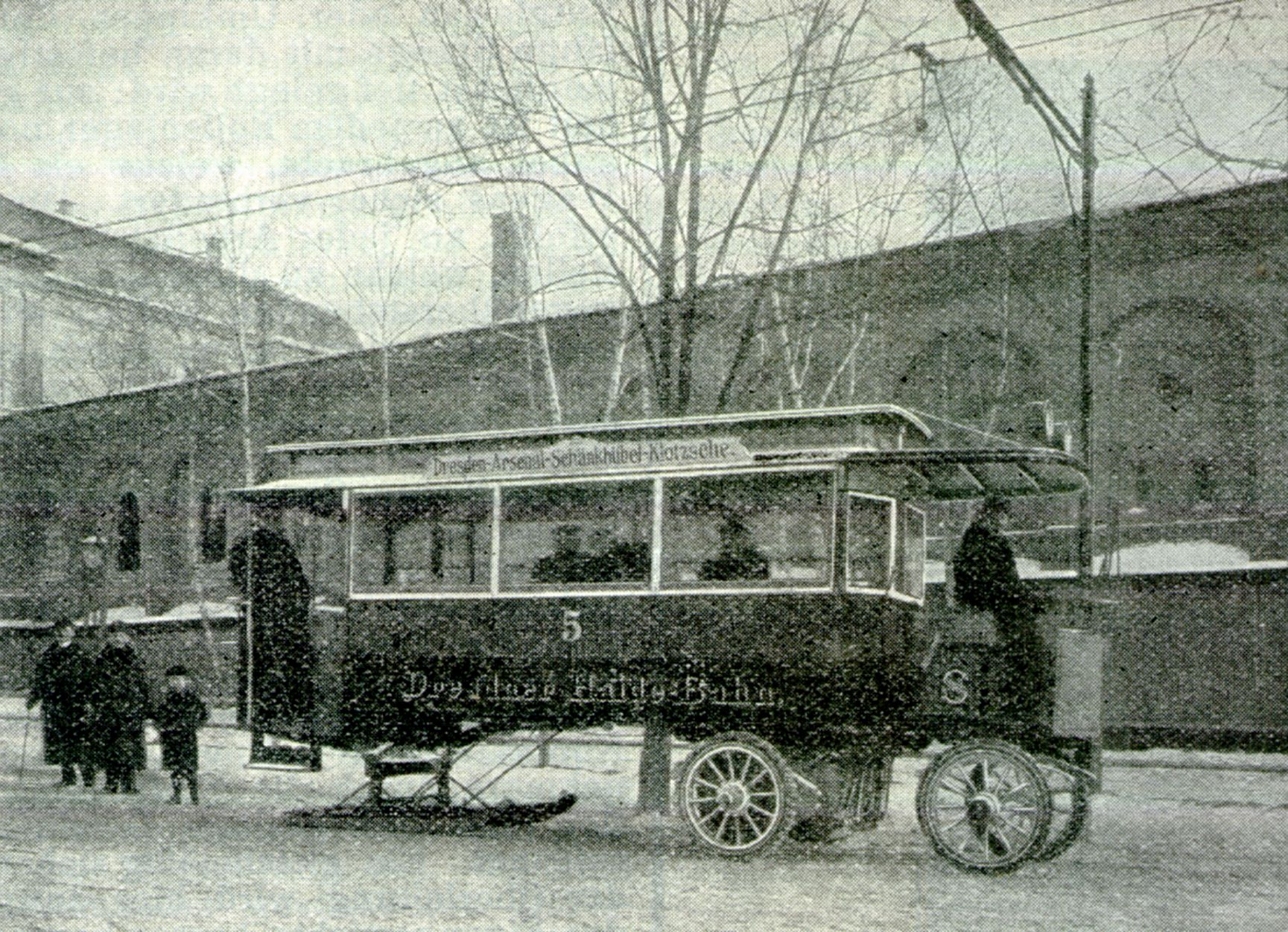 Fahrzeug der Haidebahn in Dresden mit Kufen und Eisreifen für den Winterbetrieb